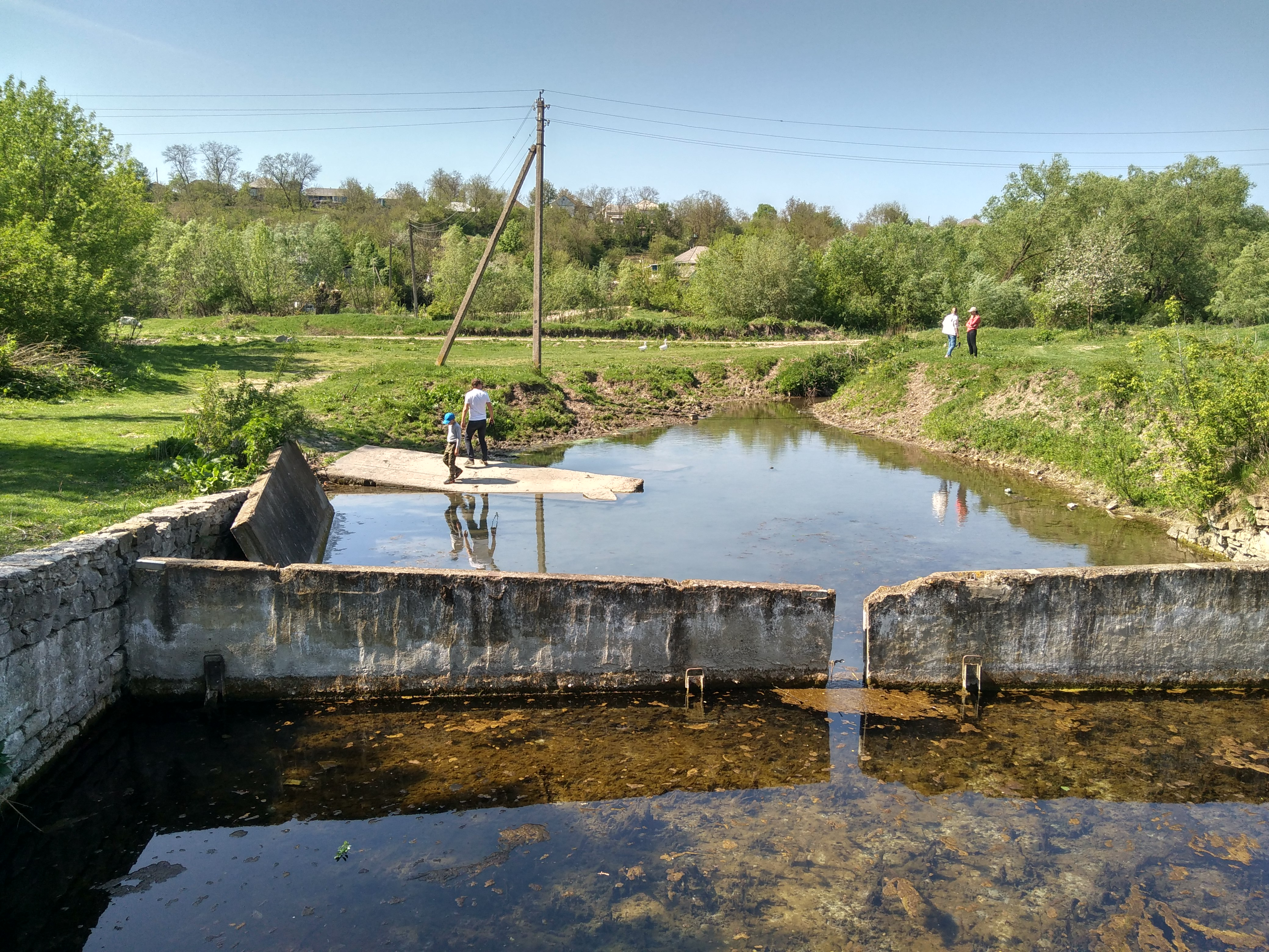 Izvorul din satul Codreni, monument al naturii amplasat în raionul Ocnița, satul Codreni, la vest de biserică (cod MD-OC-mn.B-016) B-016